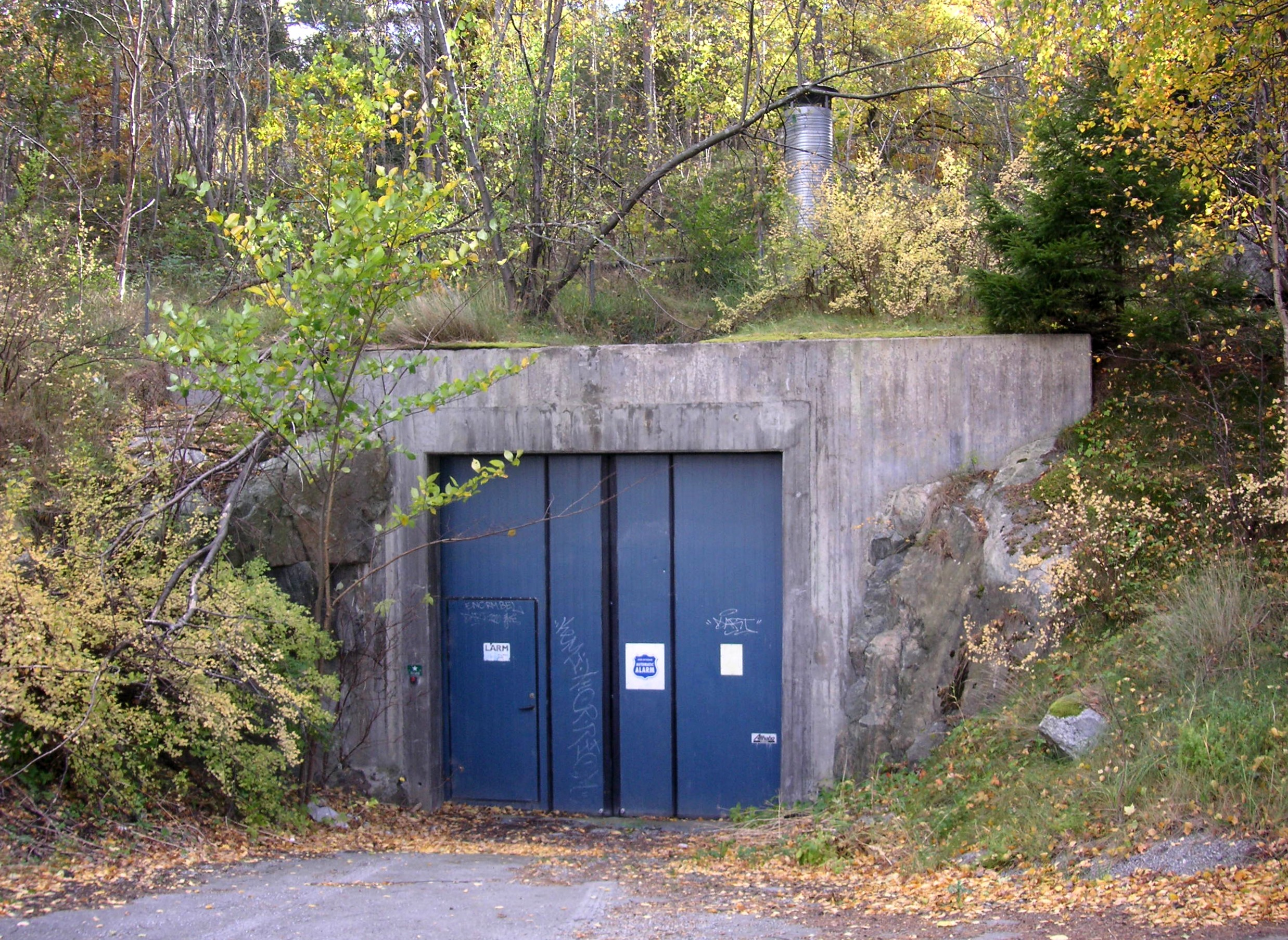 Bromma reningsverk, Nockebyanläggningen